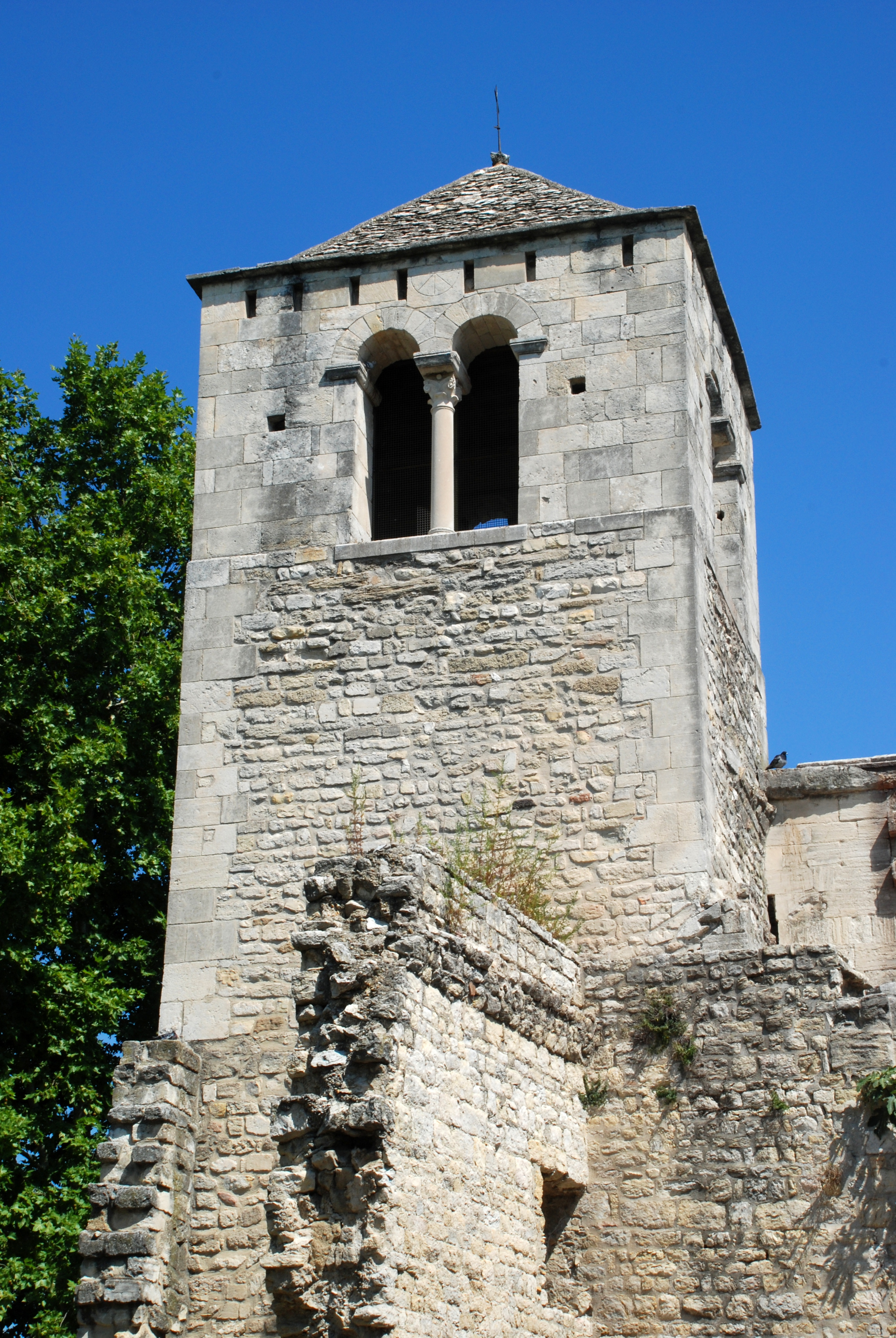 France - Provence - Avignon - Abbaye de Saint-Ruf